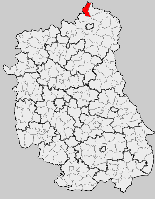 Map of gmina Konstantynów, Biała Podlaska county, Lublin voivodship Mapa gminy Konstantynów, powiat bialski, województwo lubelskie